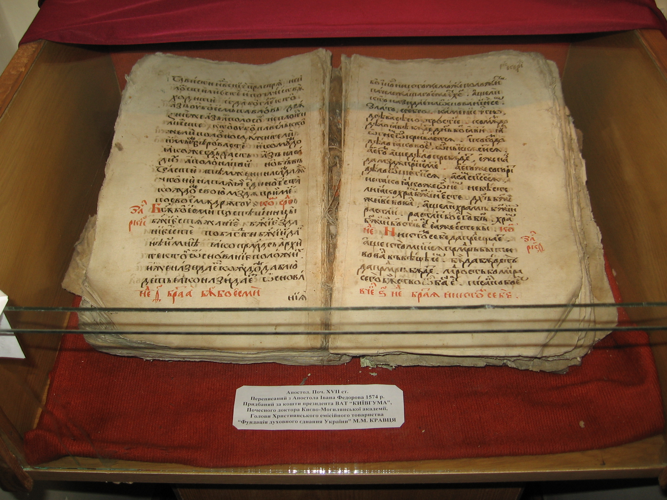 Апостол: Фото